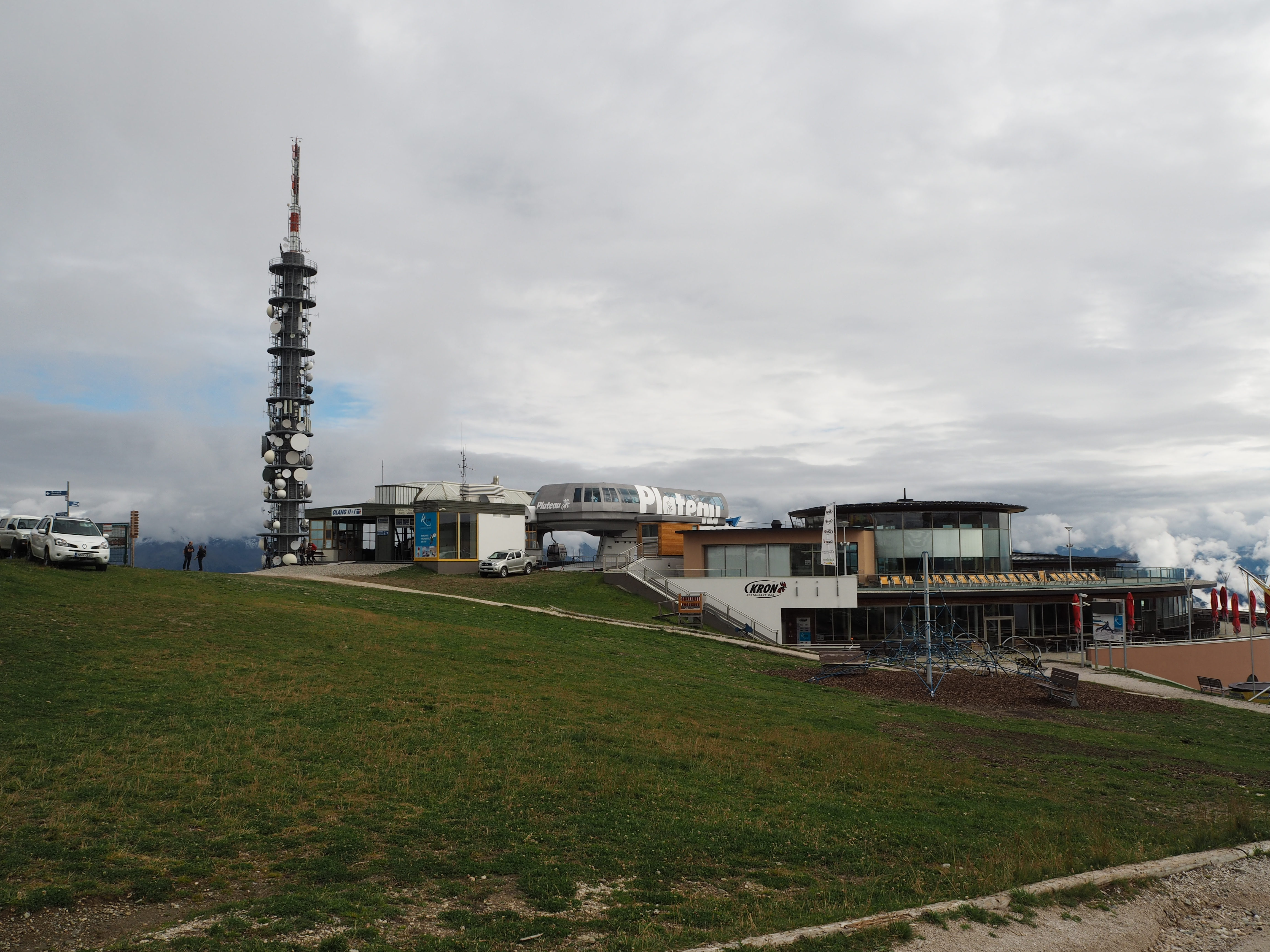 Kronplatz-Gipfel mit Technischen Einrichtungen, Restaurants und Liftstationen